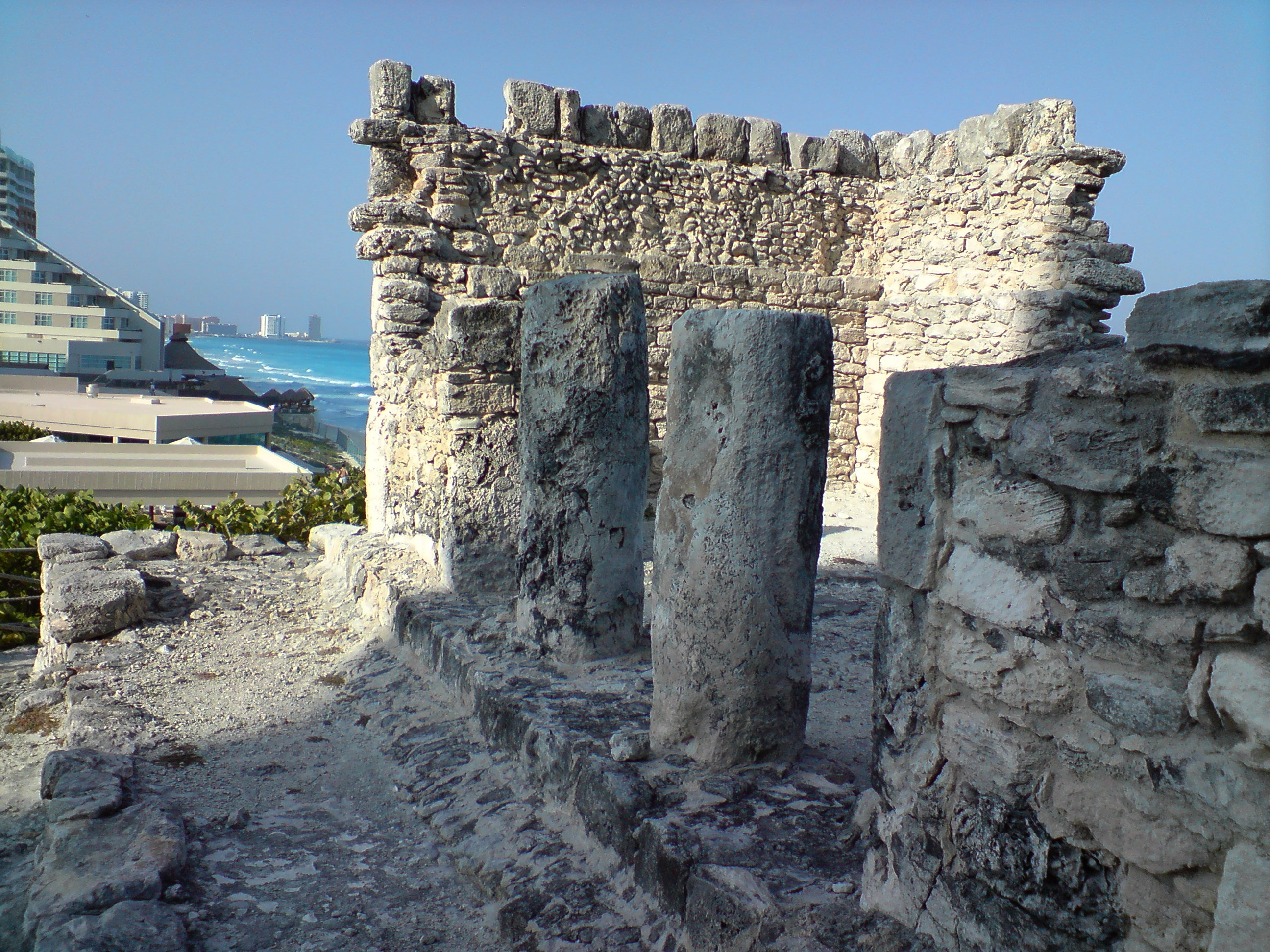 Zona Arqueológica Yamil Lu'um, templo del Alacrán, Km 12, zona hotelera, Cancún